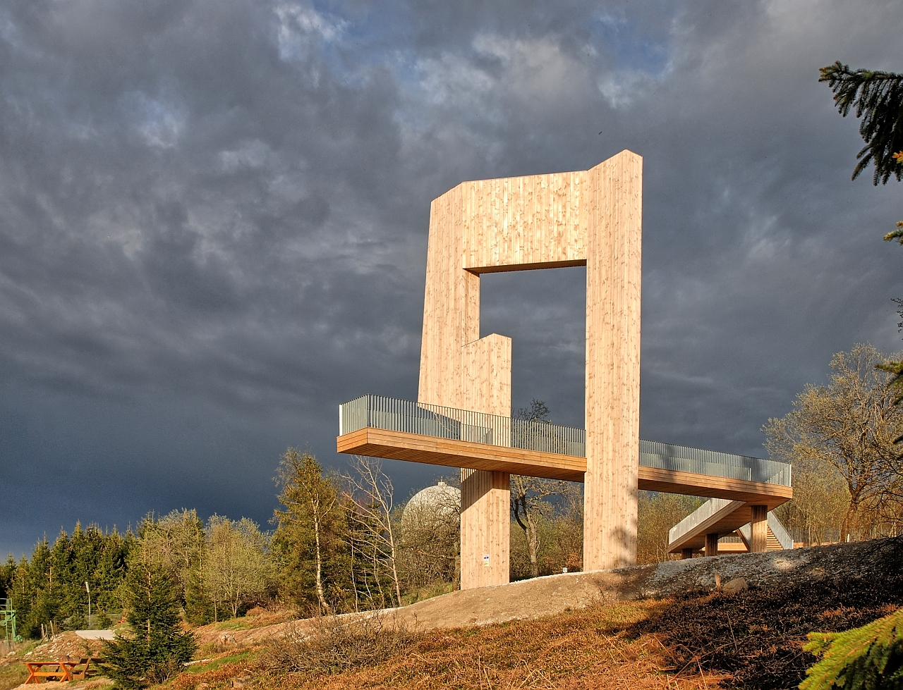 Christoph Mancke: "Windklang" (2011). Standort: Gipfel des Erbeskopfs